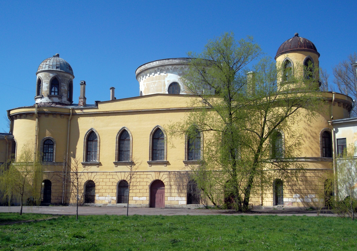 Чесменский дворец. Юго-восточный фасад напротив Чесменской церкви. Арх. Ю. Фельтен, 1774-1777 гг.